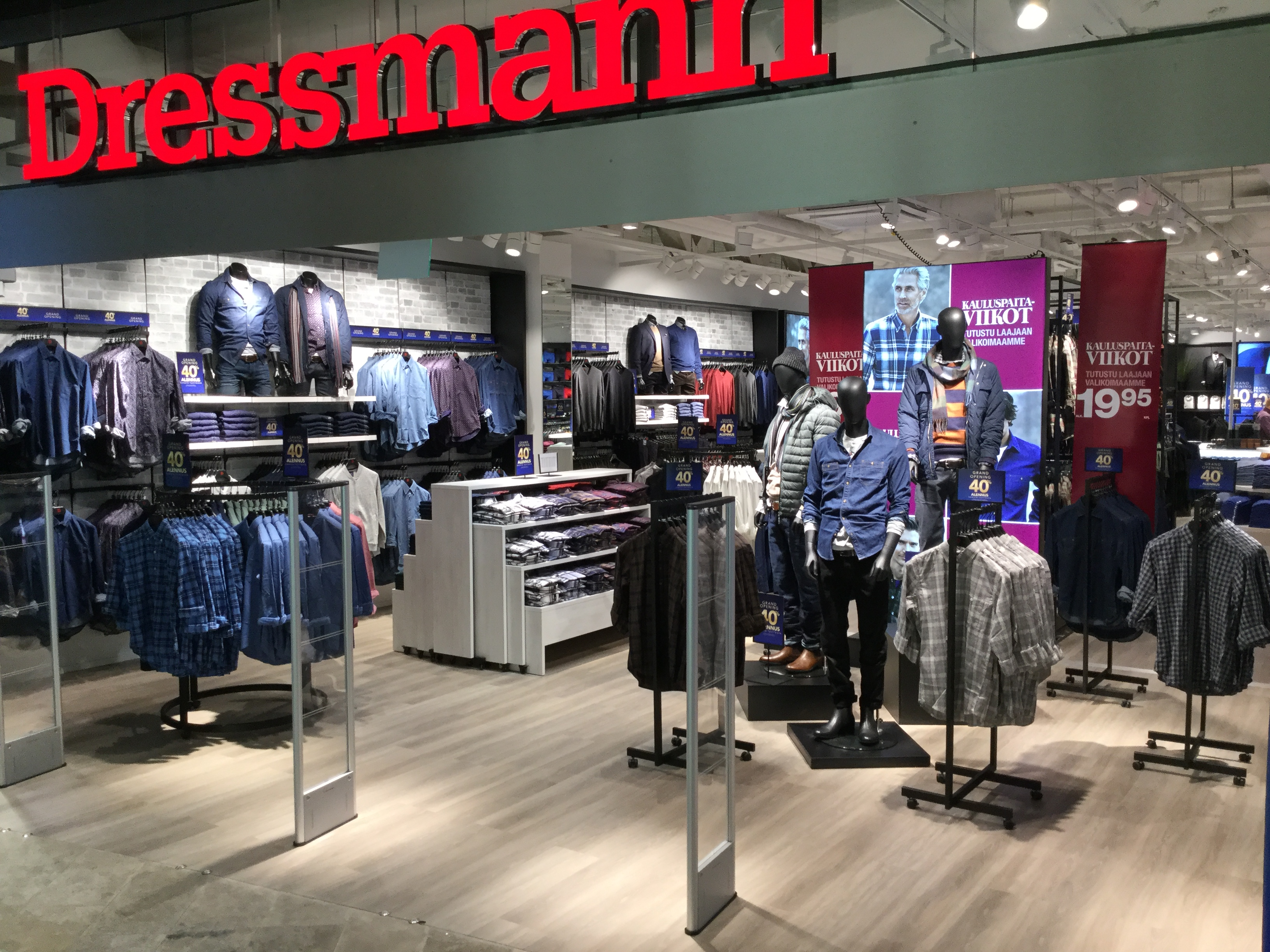 Dressmann-myymälä kauppakeskus Redissä.